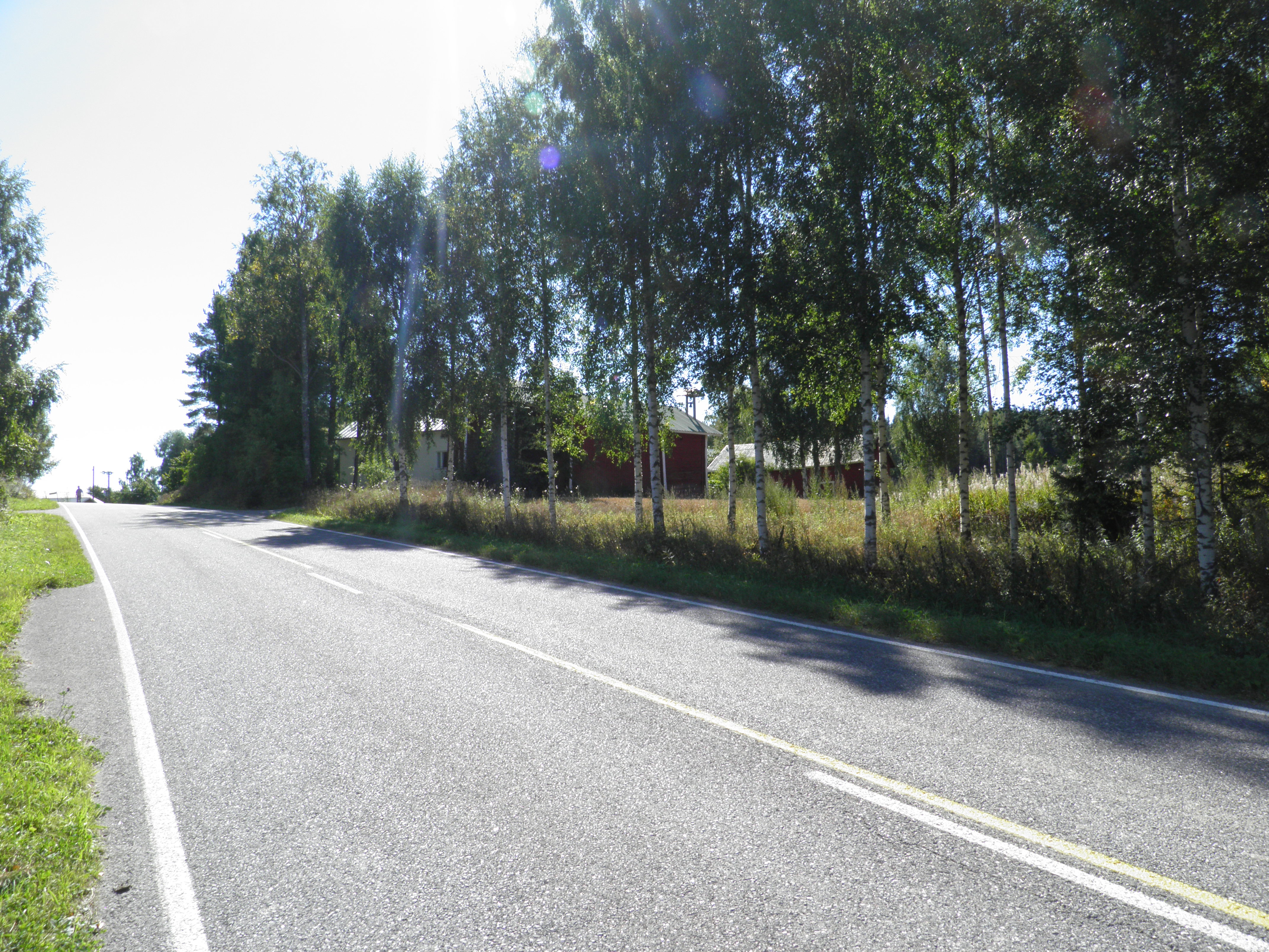 Hyrkkälän kylää Hämeenkoskella pohjoisesta nähtynä.